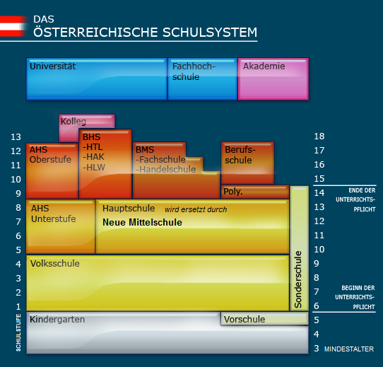 ? Vom vorherigen Bild etwas übernommen (Bild:schulsystem_oesterreich.png; ursprünglich erstellt von: Thomas G. Graf) Mögliche Lizensierungen